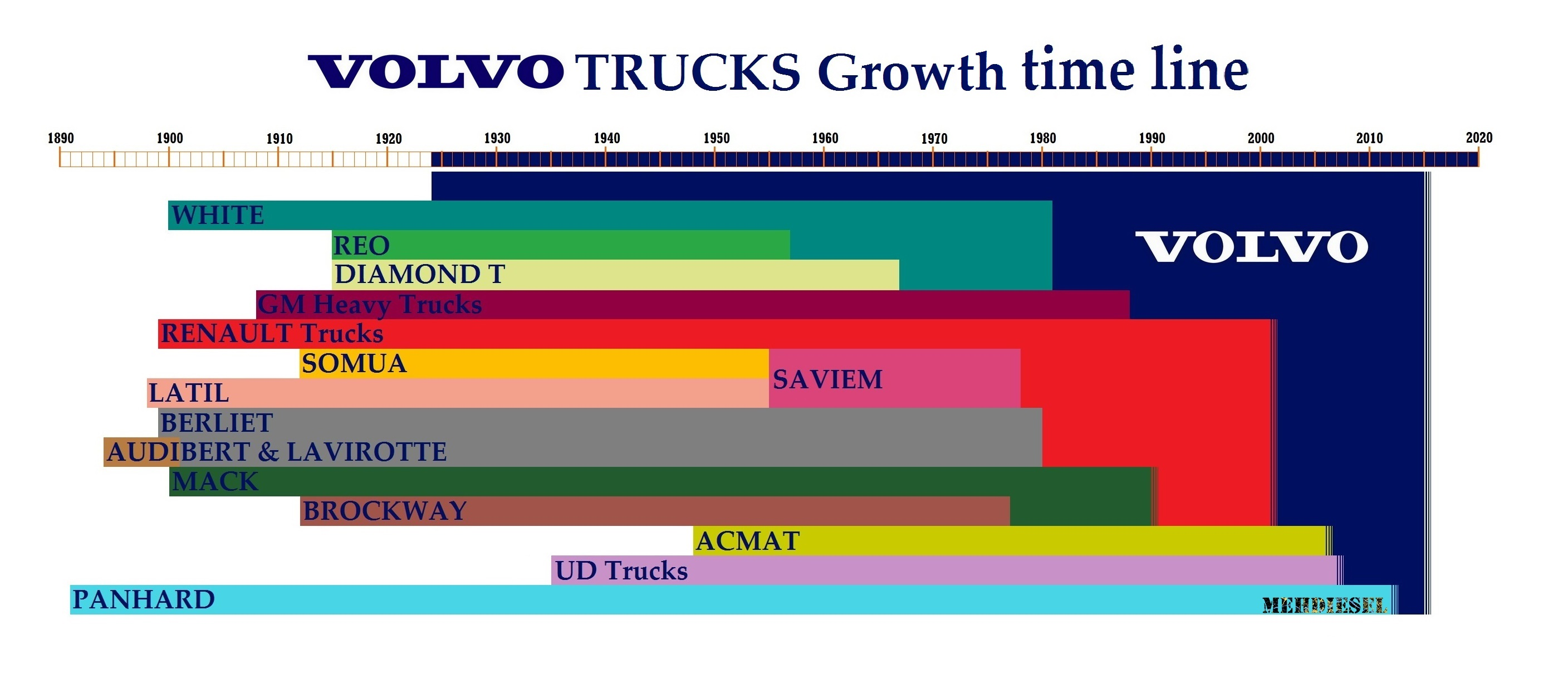 خط تکامل کمپانی معظم ولوو